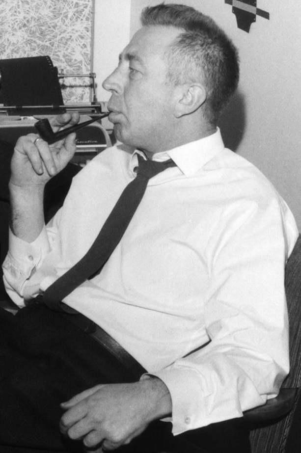 Yleisradion kommentaattori ja kirjeenvaihtaja Knud Möller (1919-1993) vuonna 1965.